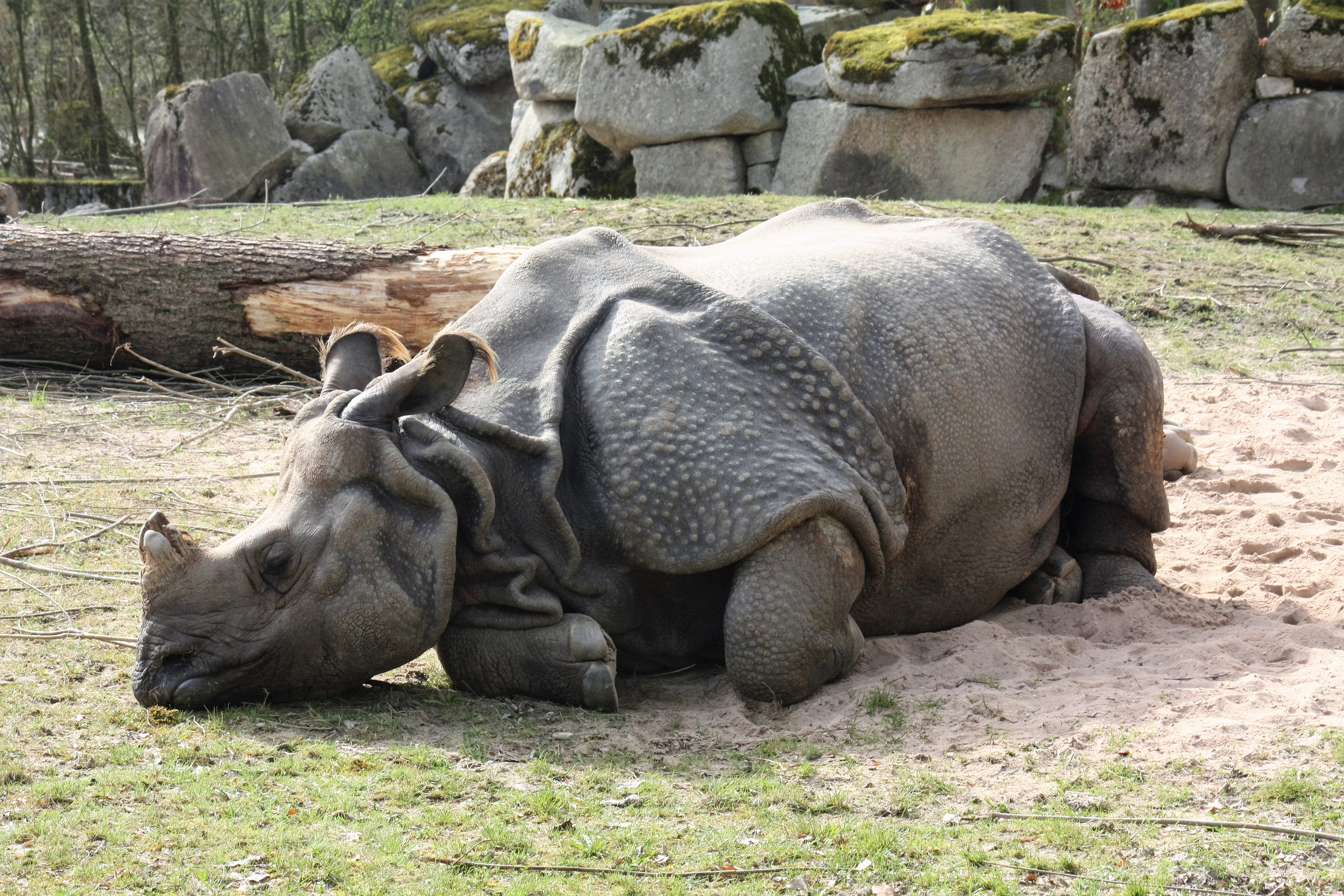 Indisches Panzernashorn im Zoo Hellabrunn